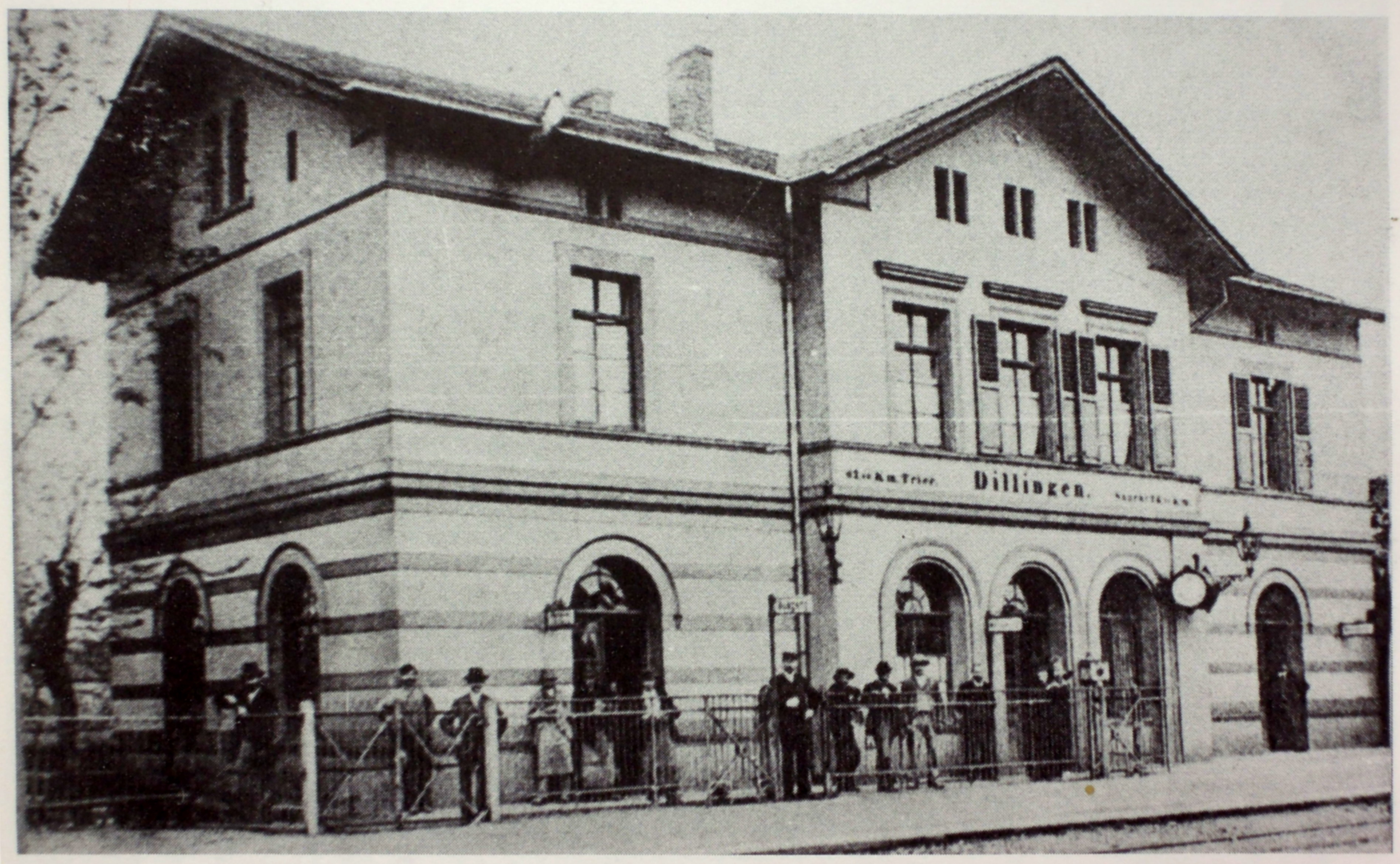 Bahnhof Dillingen. 17 Jahre nach Nürnberg Fürth lehnte die Gemeinde Dillingen 1852 die Forderung der Regierung nach kostenloser Abgabe der für eine geplante Bahnelinie benötigten Flächen ab.